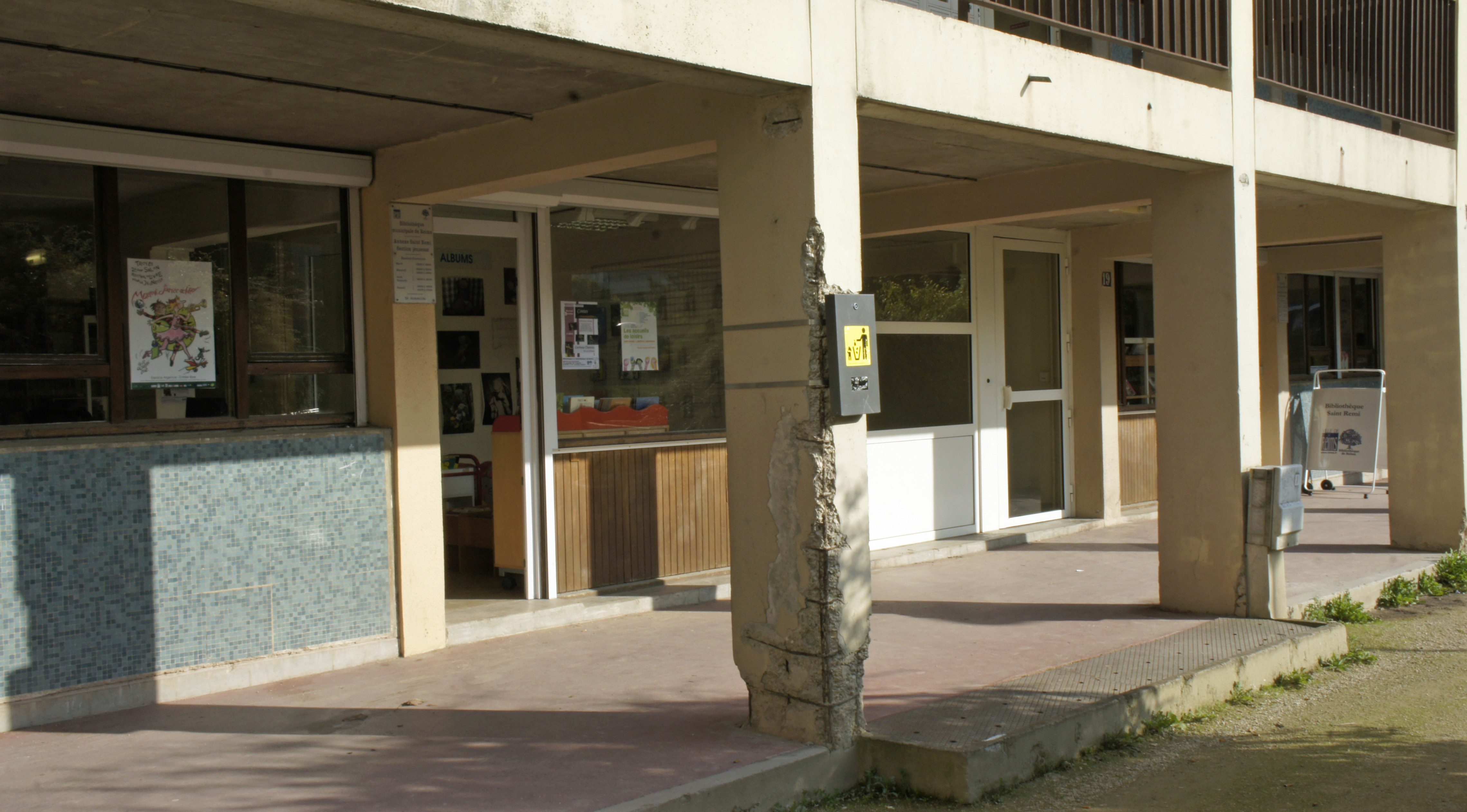 Bibliothèque Saint-Remi faisant partie du réseau de médiathèques de Reims.